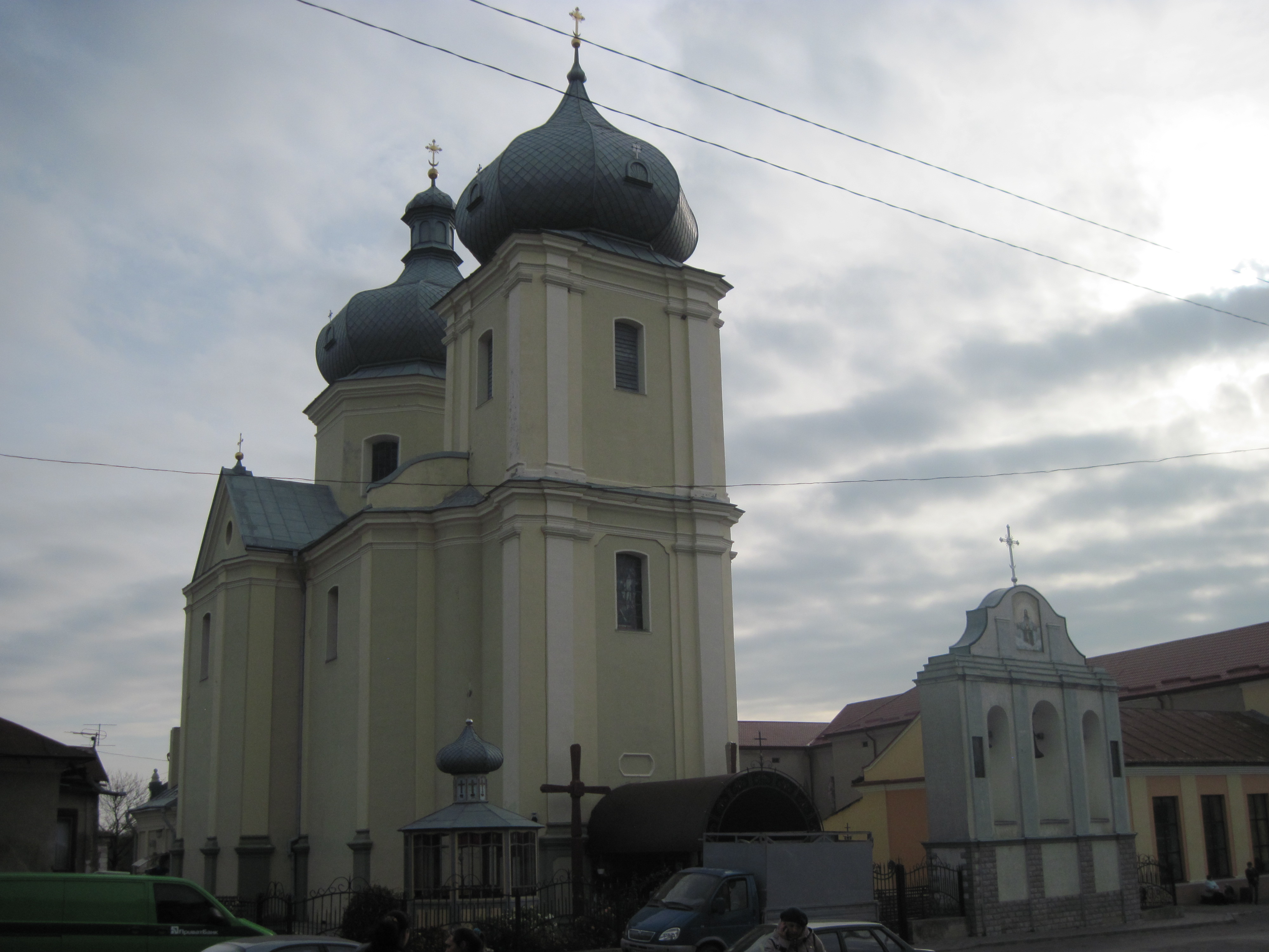 Збараж, церква, 2014